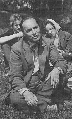 Valdemar Nyman m.fl. i gröngräset. Beskuren från File:Nyman picknick.jpg. This photograph is in the public domain in Finland, because either a period of 50 years has elapsed from the year of creation or the photograph was first published before 1966. The §49a of the Finnish copyright law of 2005 specifies that photographs not considered to be "works of art" become public domain 50 years after they were created. The 50 years from creation protection period came into force in 1991. Before that the protection period was 25 years from the year of first publication according to the §16 of the law of protection of photographs of 1961. Material already released to public domain according to the 1961 law remains in public domain, and therefore all photographs (but not photographic works of art) released before 1966 are in the public domain. See Commons:Copyright_rules_by_territory#Finland for details. If you think this picture should be considered a work of art, nominate it for deletion. To uploader: Please provide where the image was first published and who created it.The material with this copyright tag should not be used on the German-language Wikipedia. See Talk page of this template.